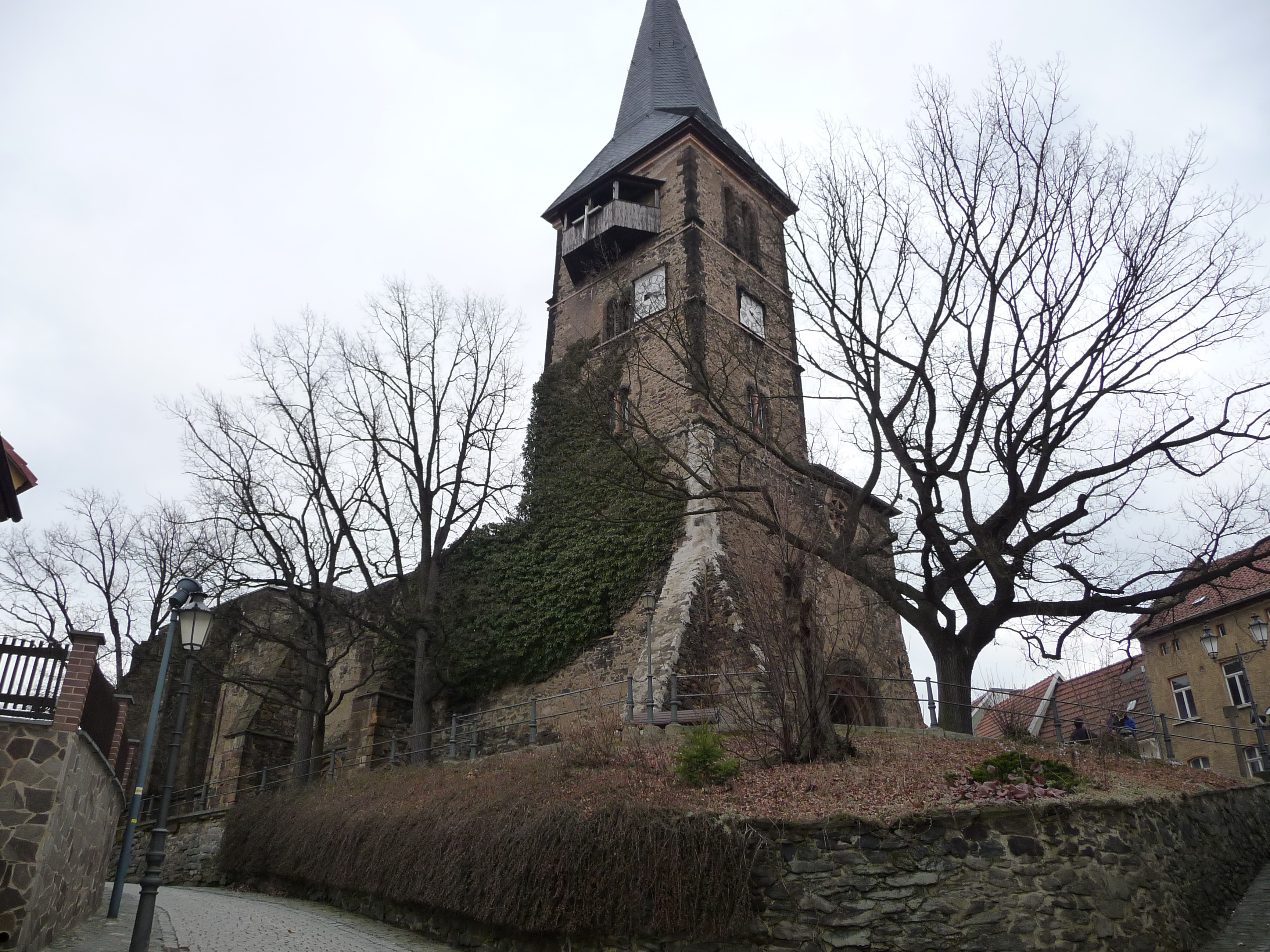 Widenkirche in Weida, Thüringen